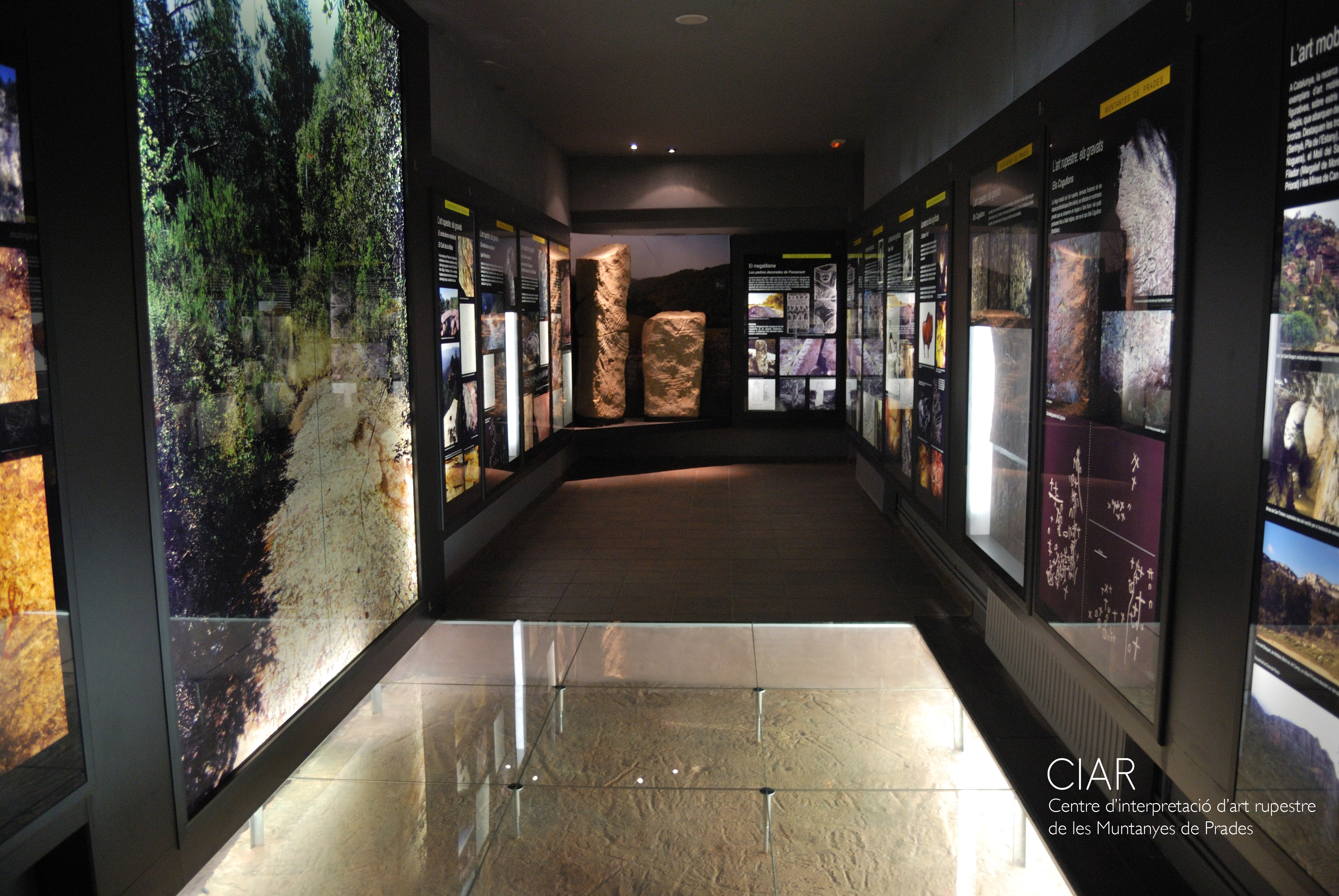 CIAR passadís 2